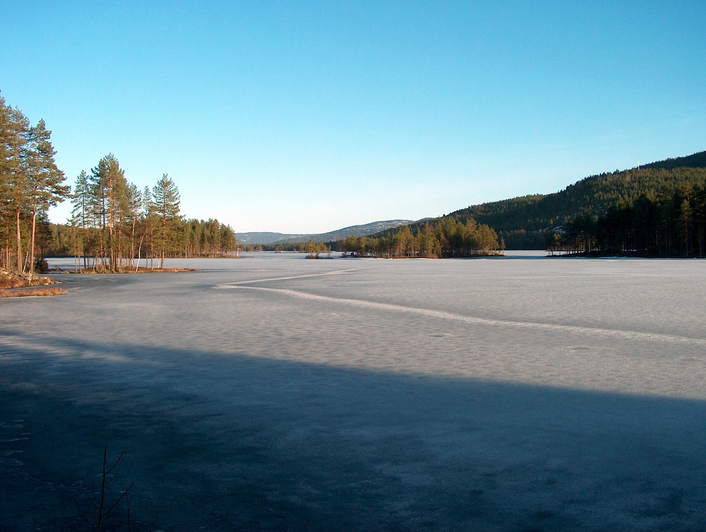 Langvannet mot sør